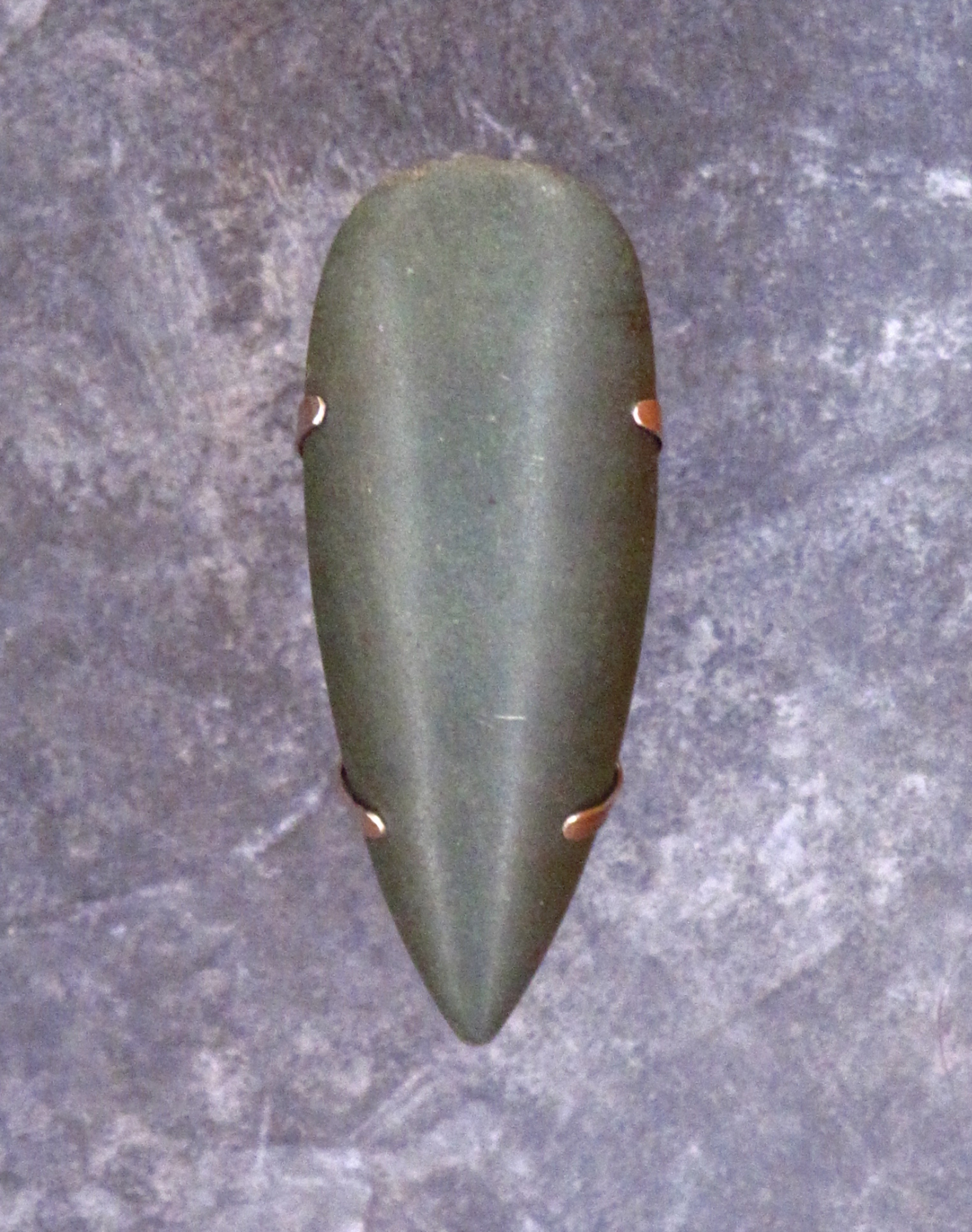 Hache polie du Néolithique (Bretagne est Univers, Musée de Bretagne, Rennes, France) Musée de Bretagne Native nameMusée de BretagneLocationRennes, FranceCoordinates48° 06′ 18″ N, 1° 40′ 30″ W Established1960Websitemusee-bretagne.frAuthority control Museofile: M0212